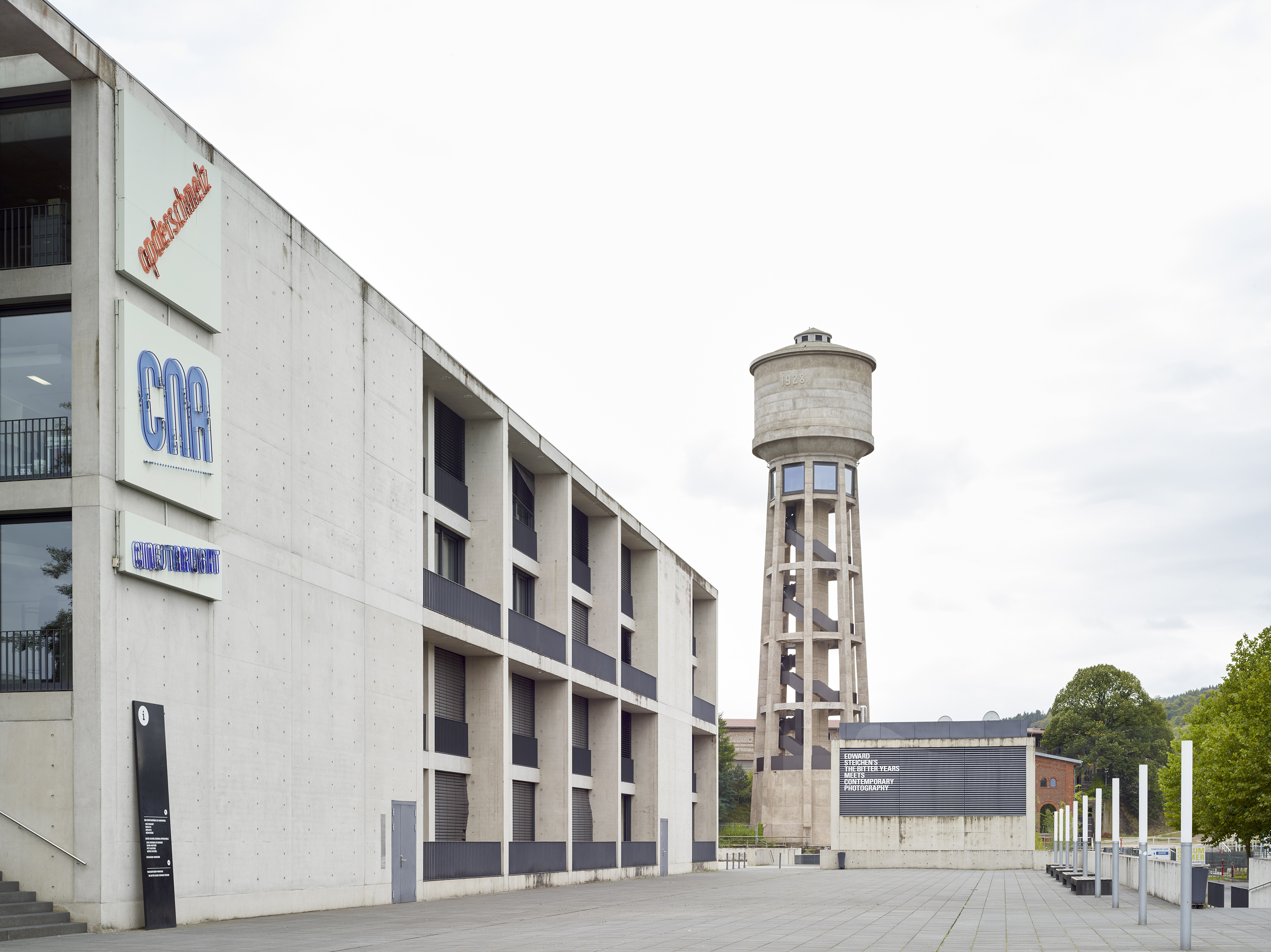 Le CNA et l'ancien château d'eau, aujourd'hui lieu d'expositions.